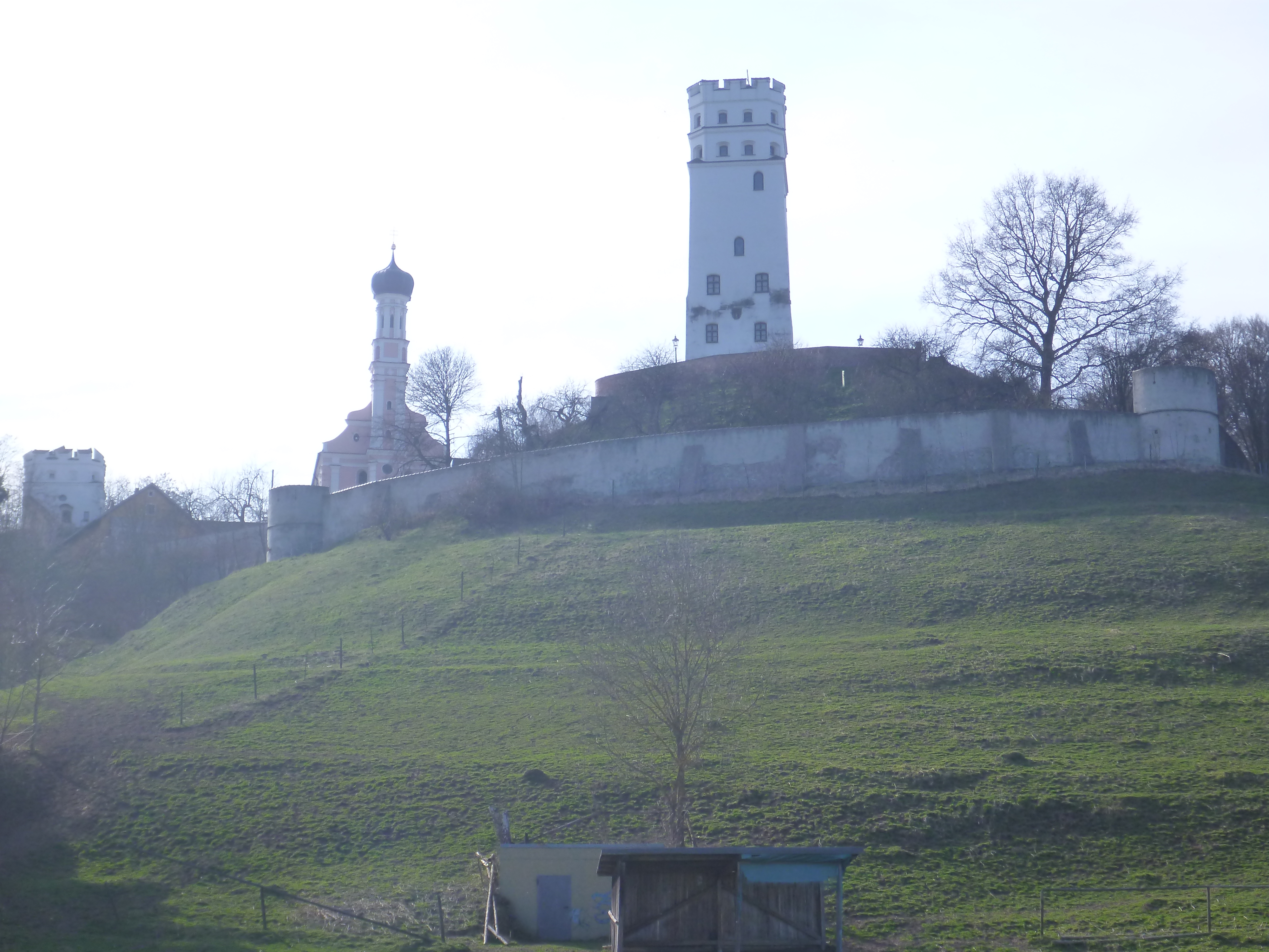 Die Burg Markt liegt auf einer nach drei Seiten gegen das Lechtal abfallenden Bergkrone und besteht aus der Hinteren (östlichen) und der Vorderen (westlichen) Burg